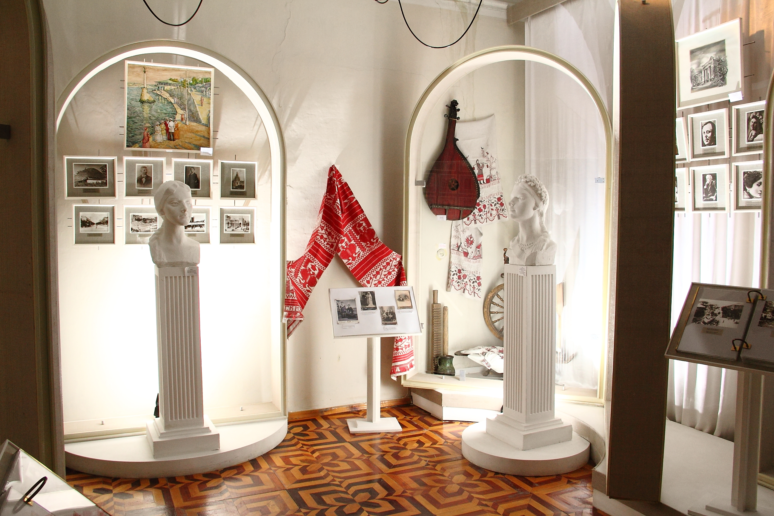 Експозиція «О. Петрусенко – видатна українська співачка» Балаклійського краєзнавчого музею